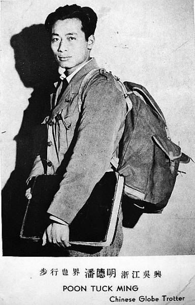 潘德明和他的《名人留墨集》